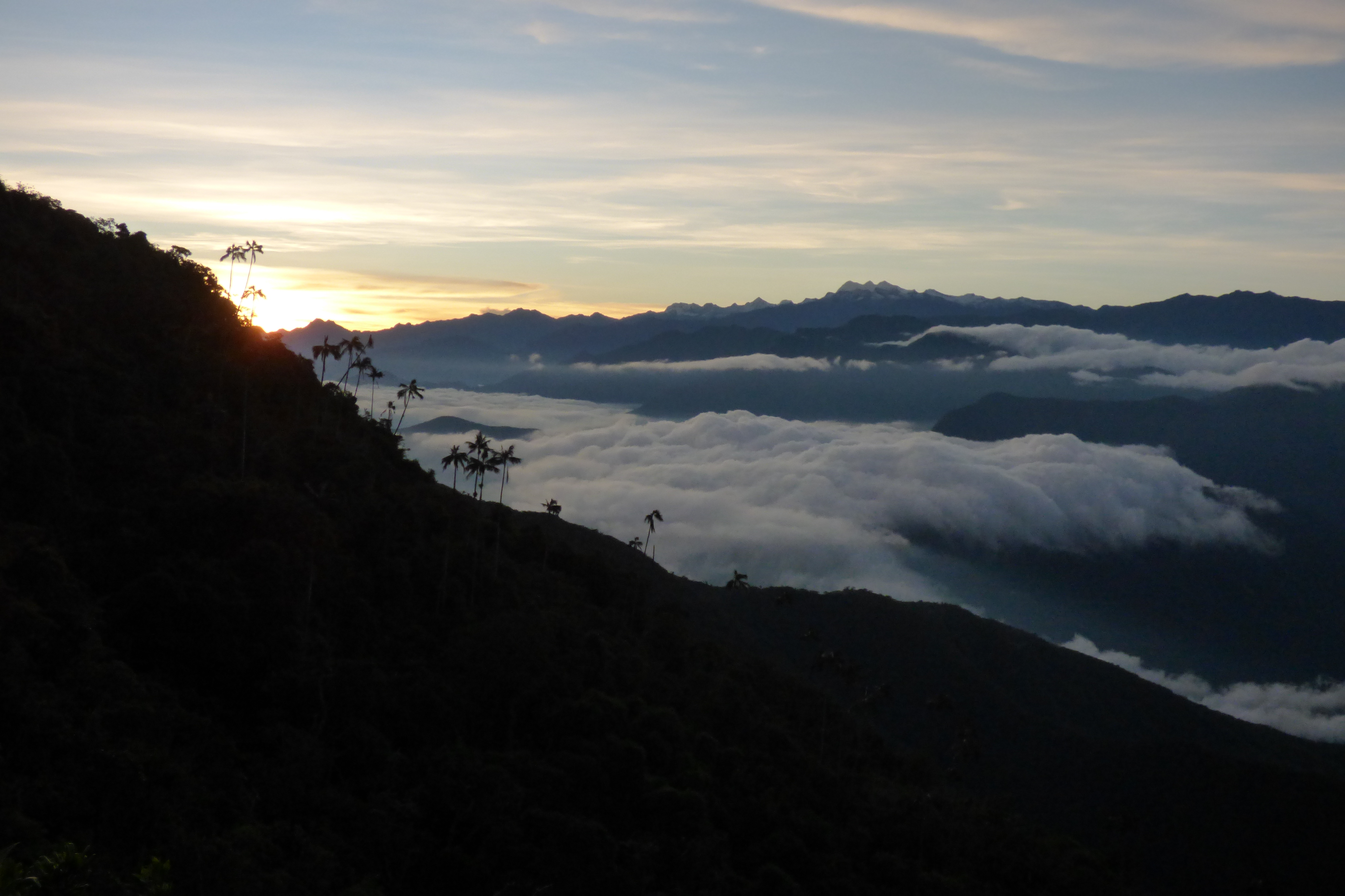 Amanecer en la Cuchilla - Nevados - Santa Marta